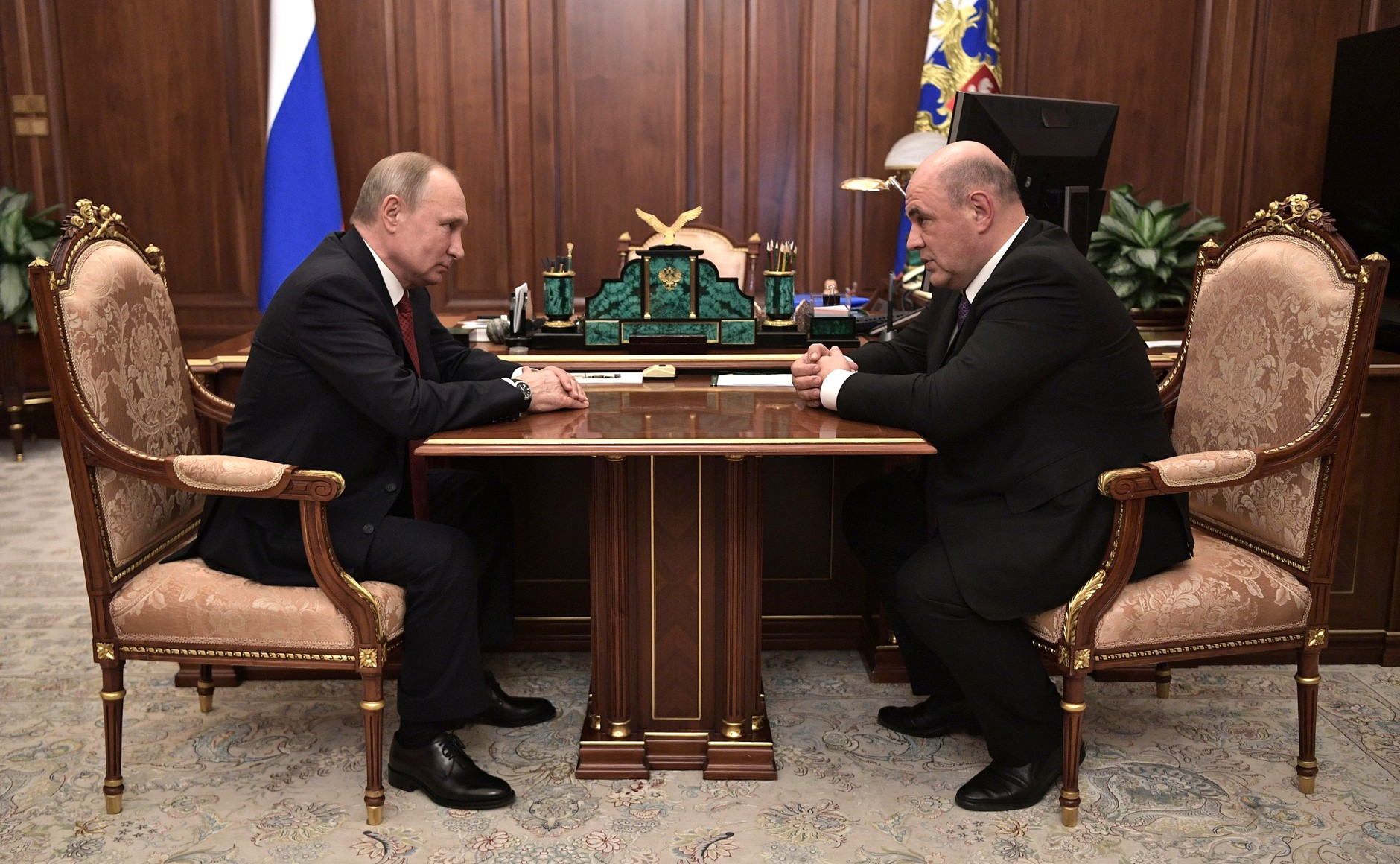 Президент внёс кандидатуру Михаила Мишустина на должность Председателя Правительства